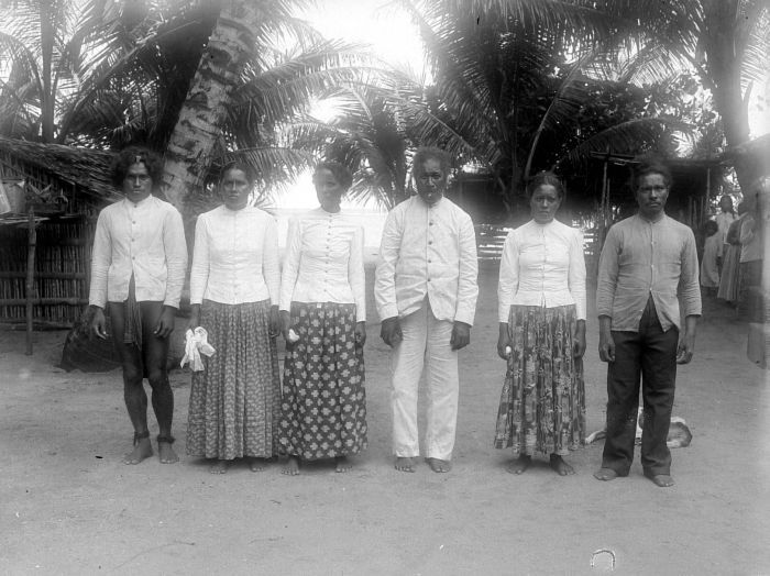 Negatief. Deze foto is gemaakt tijdens de Wichmann Expeditie Noord-Nieuw-Guinea van 1903.. Oorspronkelijke bewoners van het eiland Mapia